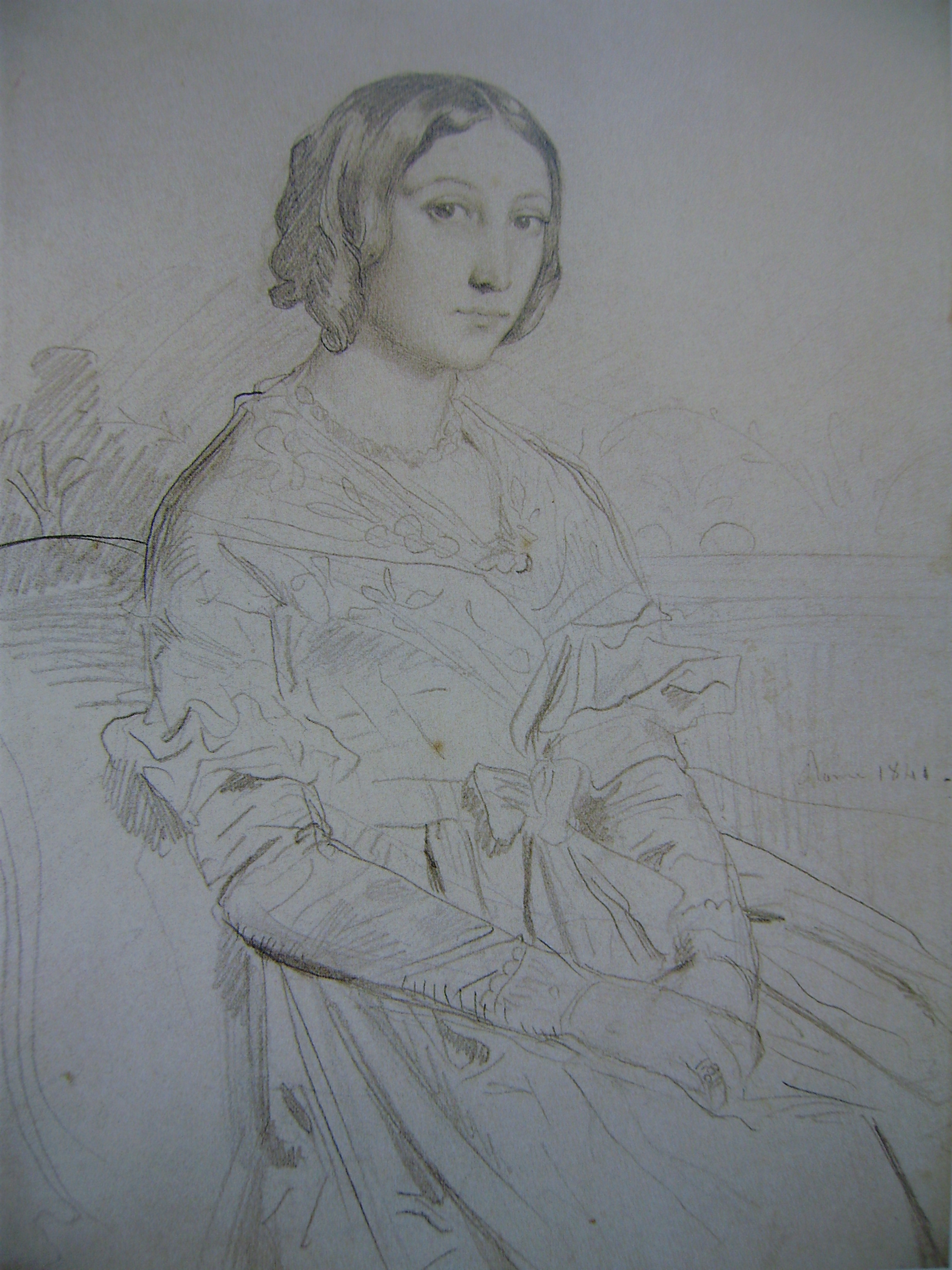 La Baronne de Prailly à Rome (Hortense Chevandier de Valdrome, 1813-1879), dessin.